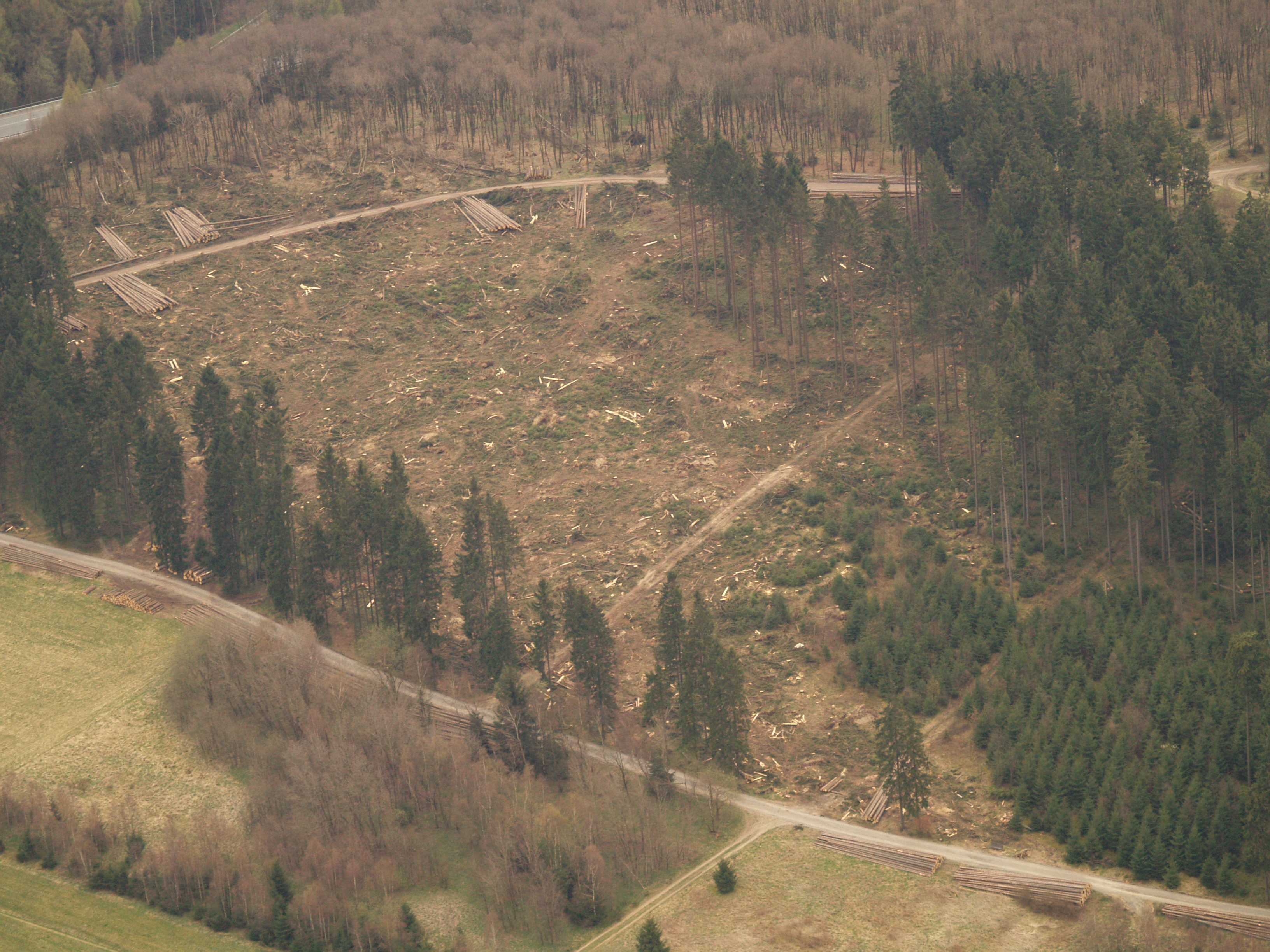 Würgendorf-Schäden durch Kyrill auf der Höh.